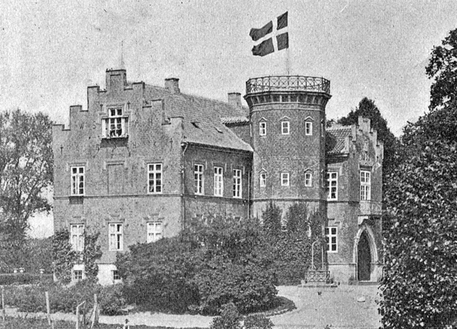 Steensgård ligger i Snøde Sogn, Langelands Nørre Herred, Tranekær Kommune.